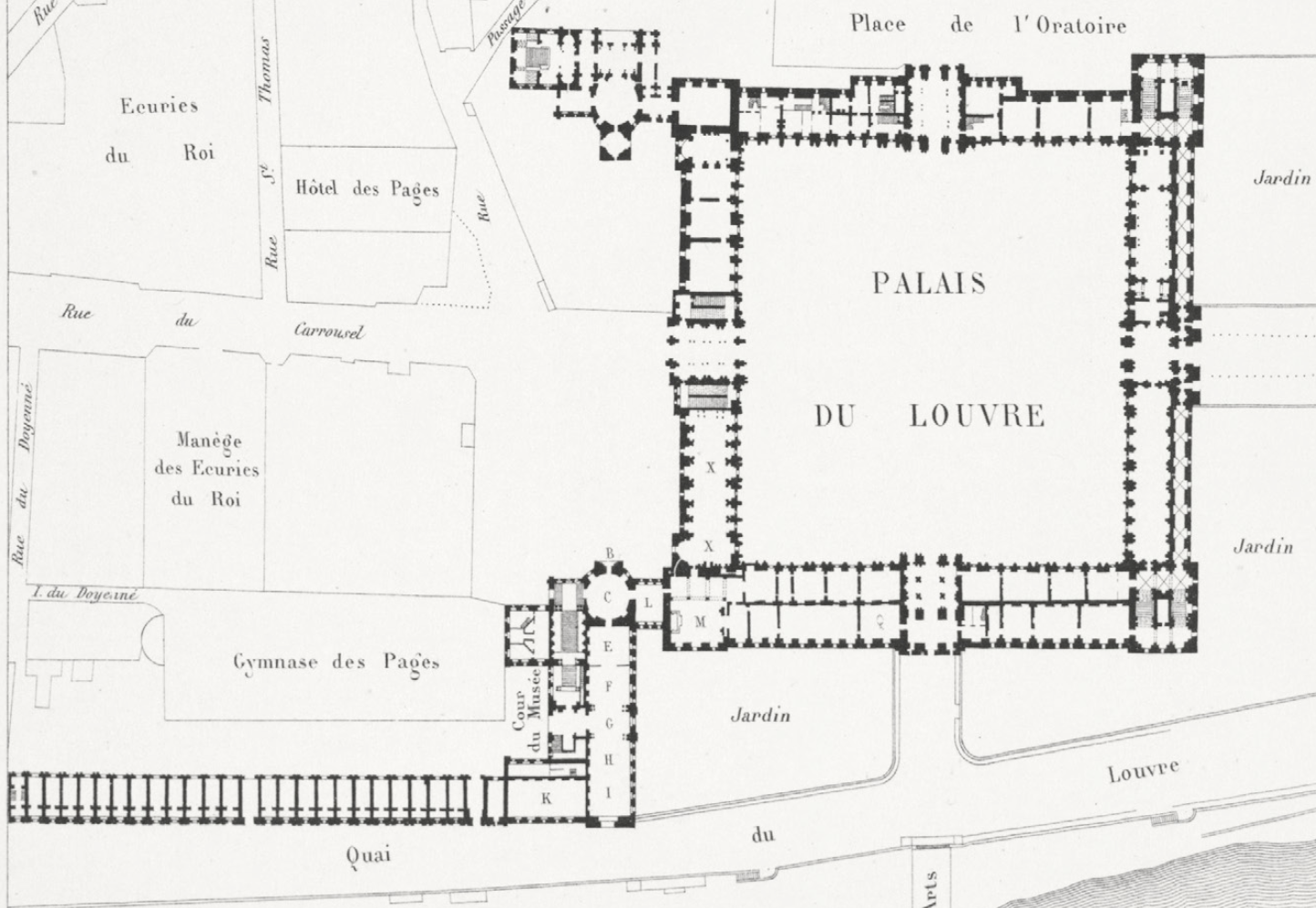 Plan de Paris lithographié, 1826